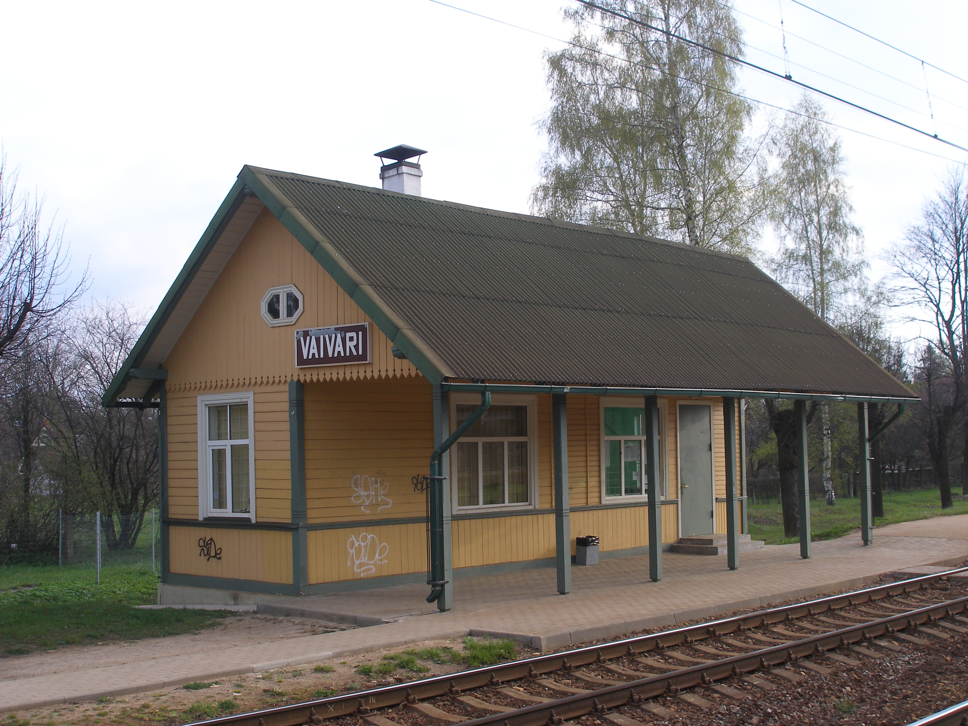 Vaivaru stacijas ēka.